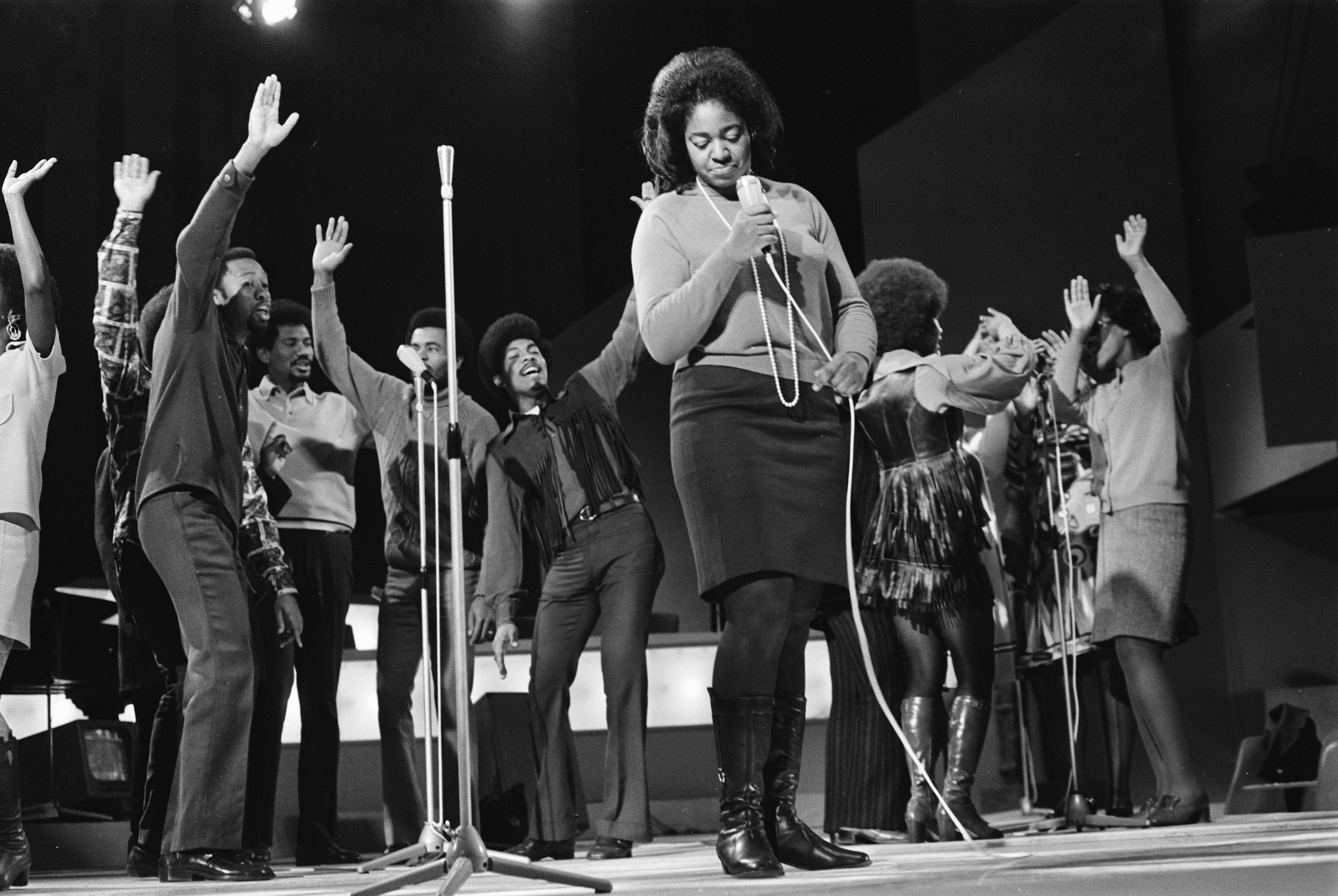 Collectie / Archief : Fotocollectie Anefo Reportage / Serie : [ onbekend ] Beschrijving : Grand Gala du Disque in RAI Amsterdam. Repetities. Edwin Hawkins Singers tijdens repetitie Datum : 26 februari 1970 Locatie : Amsterdam, Noord-Holland Trefwoorden : REPETITIES Persoonsnaam : Edwin Hawkins Singers Instellingsnaam : RAI Fotograaf : Mieremet, Rob / Anefo Auteursrechthebbende : Nationaal Archief Materiaalsoort : Negatief (zwart/wit) Nummer archiefinventaris : bekijk toegang 2.24.01.05 Bestanddeelnummer : 923-2979